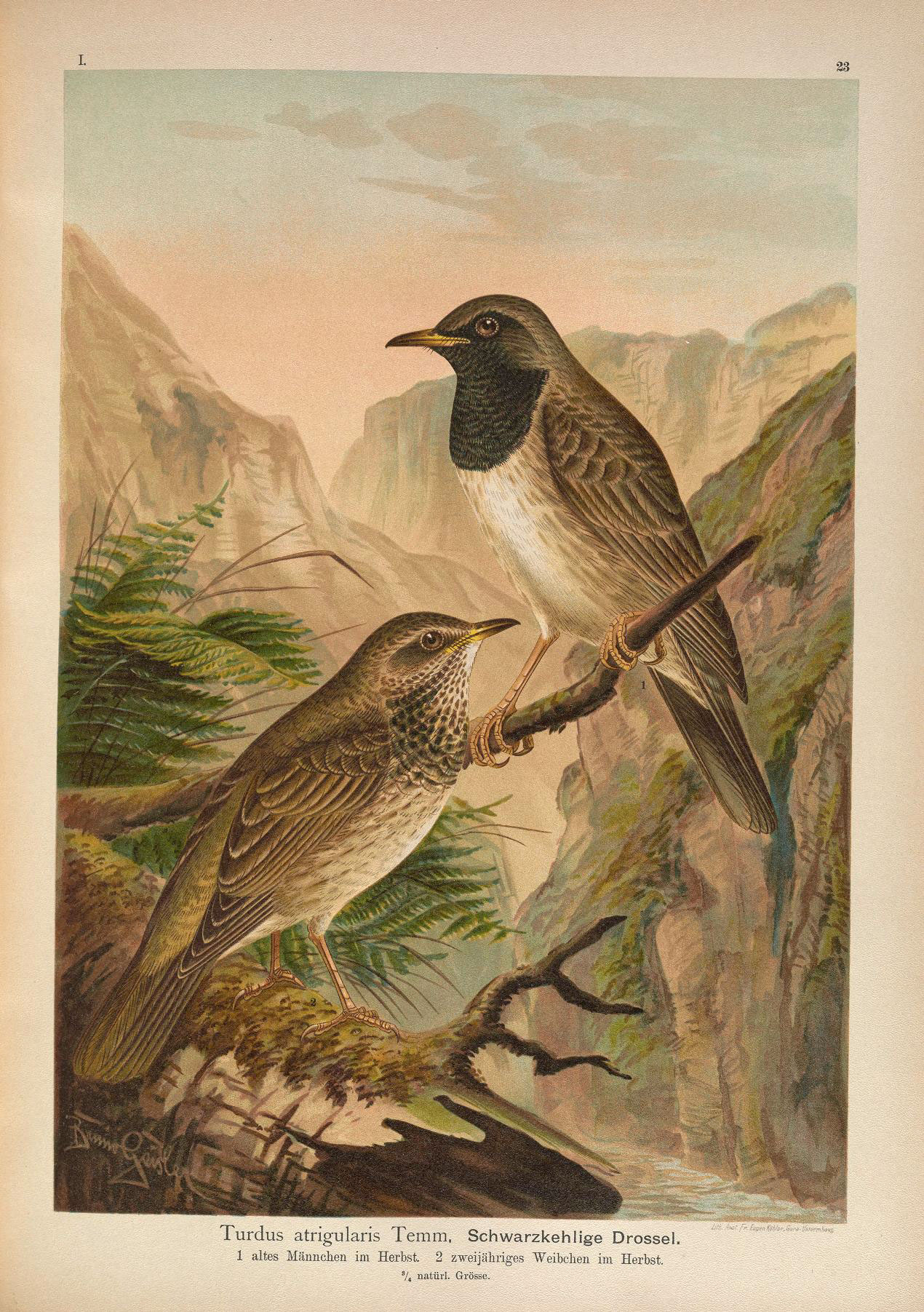 I. Turdus atrigularis Temm. Schwarzkehlige Drossel, 1 altes Männclieii im Herbst. 2 zweijähriges Weibchen im Herbst. 1.1 tr. .Y-v." Fp- Eugen Kohlep.Guna-lfntprmh^uf V4 natürl. Grösse.